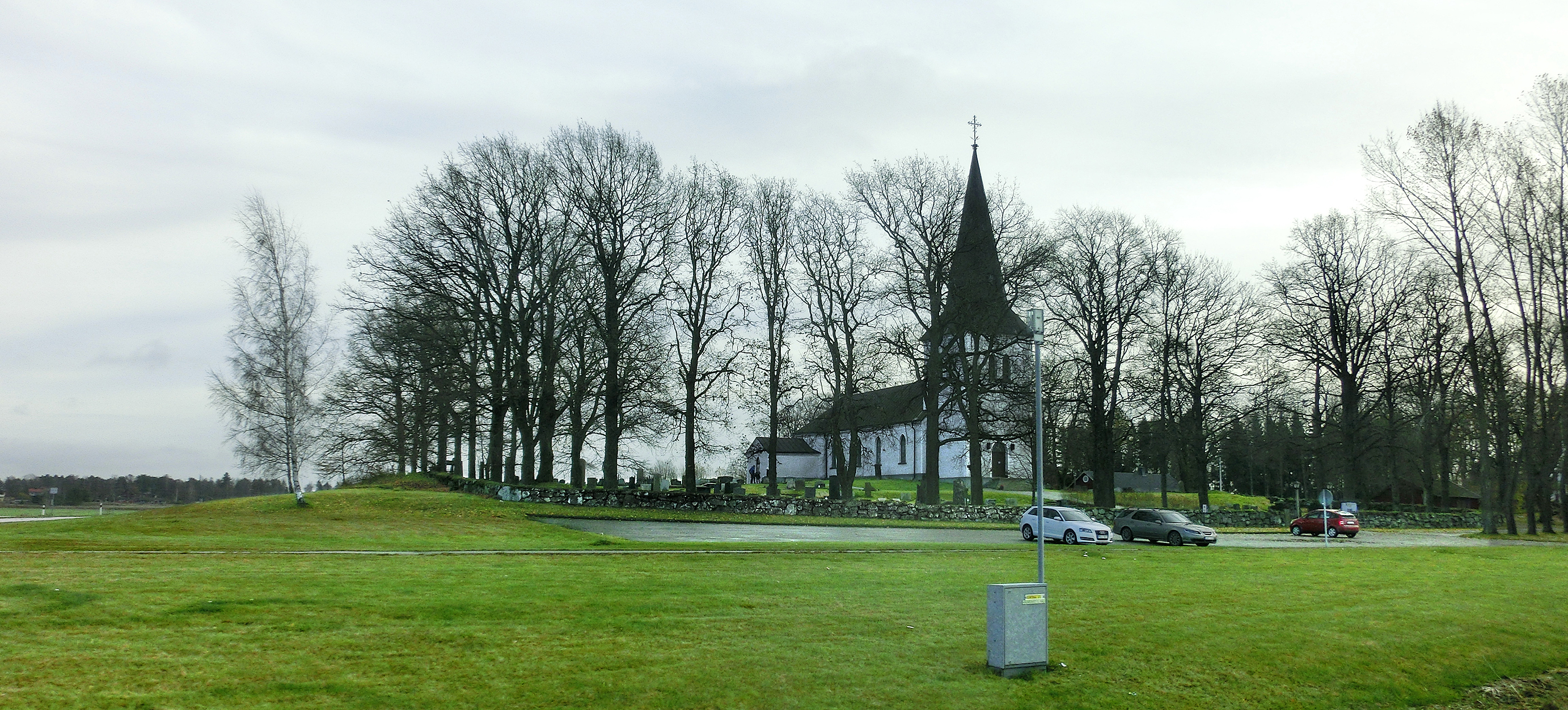 Hjälstads kyrka sedd från rondellen där Länsväg 200 korsar Länsväg 201 i Hjälstads socken, Töreboda kommun, f.d. Skaraborgs län, Västergötland, Västra Götalands län, Sverige.